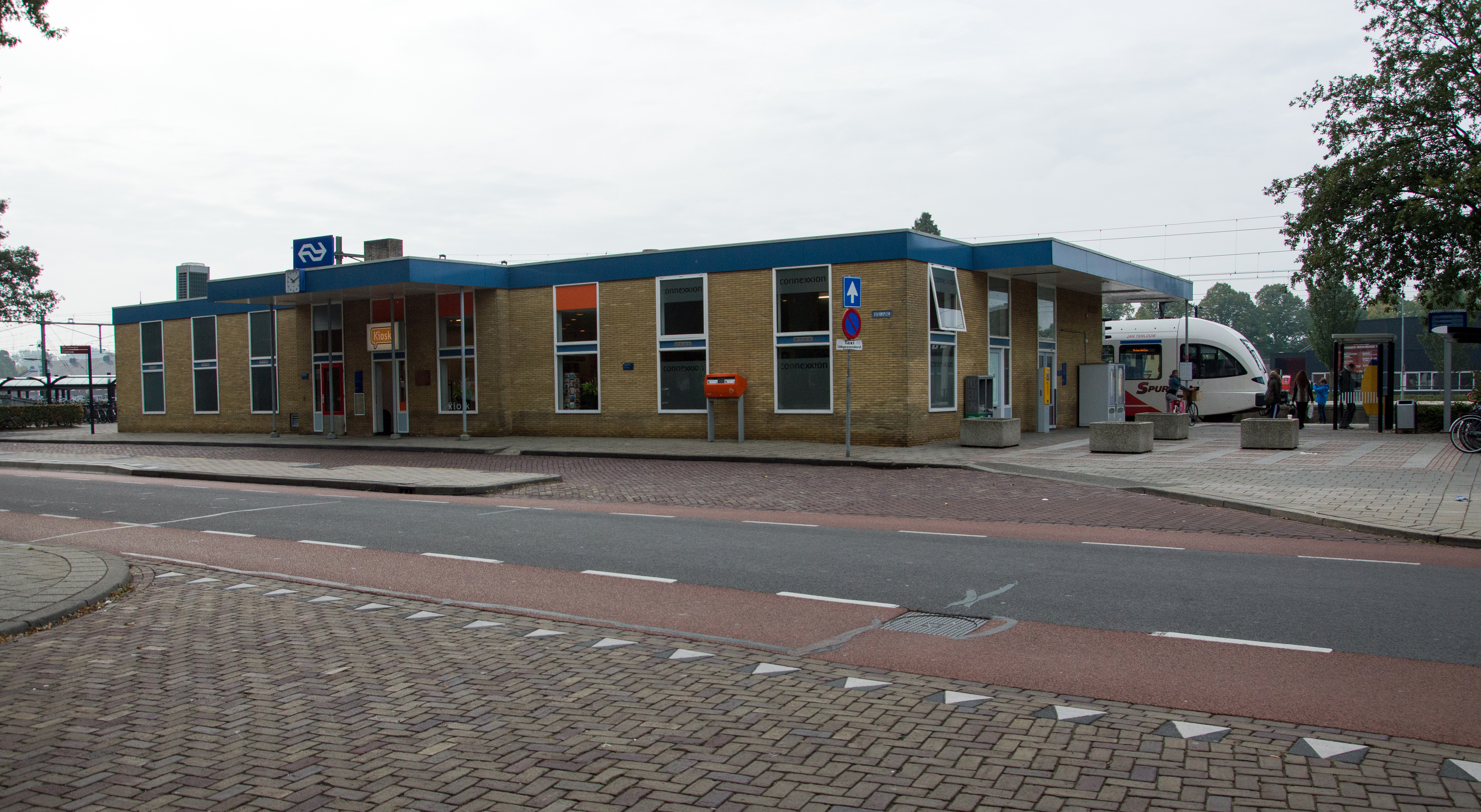 Vooraanzicht station Zevenaar.